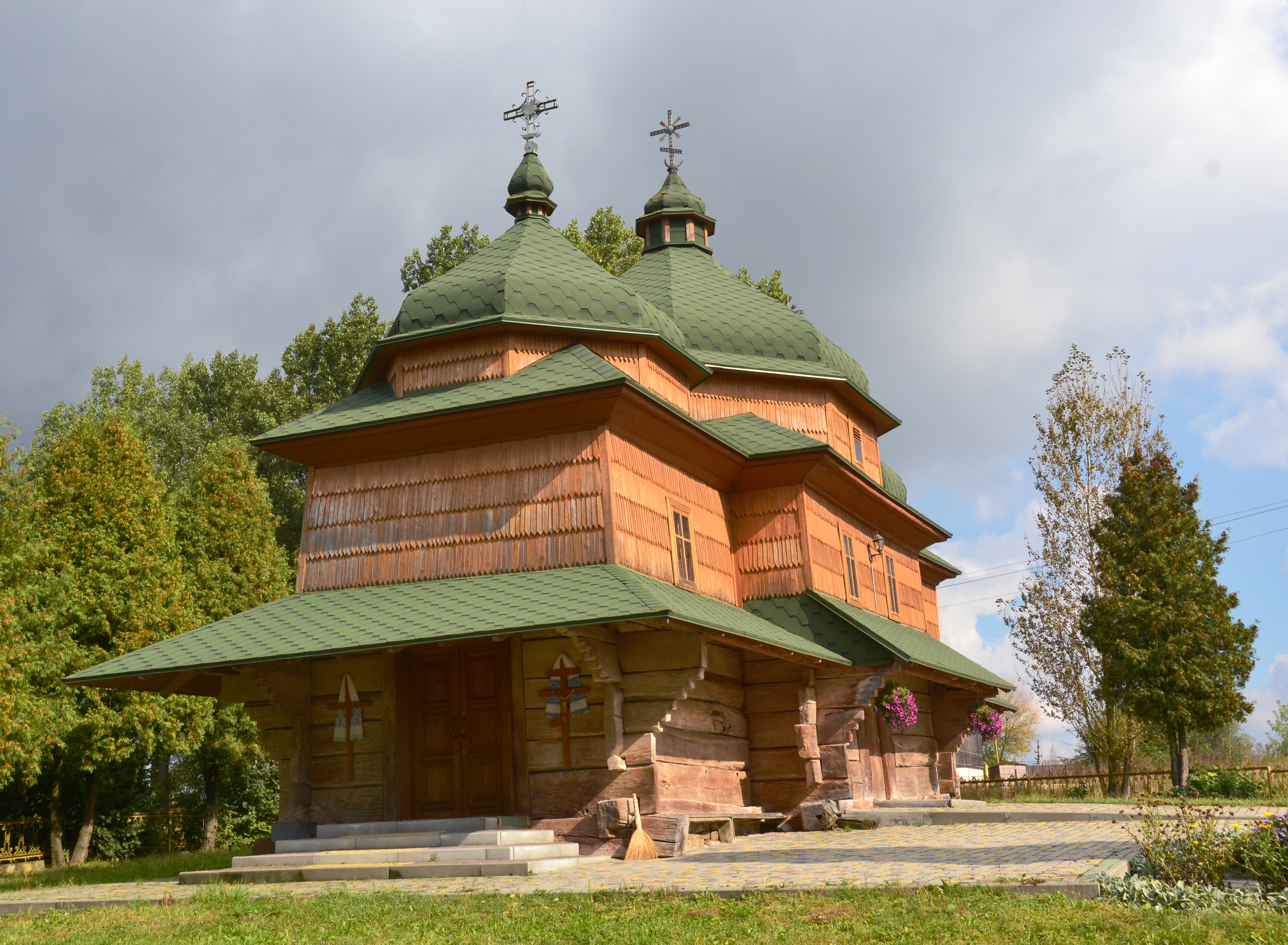 Церква Св.ігнатія (дер.), с.Горбачі